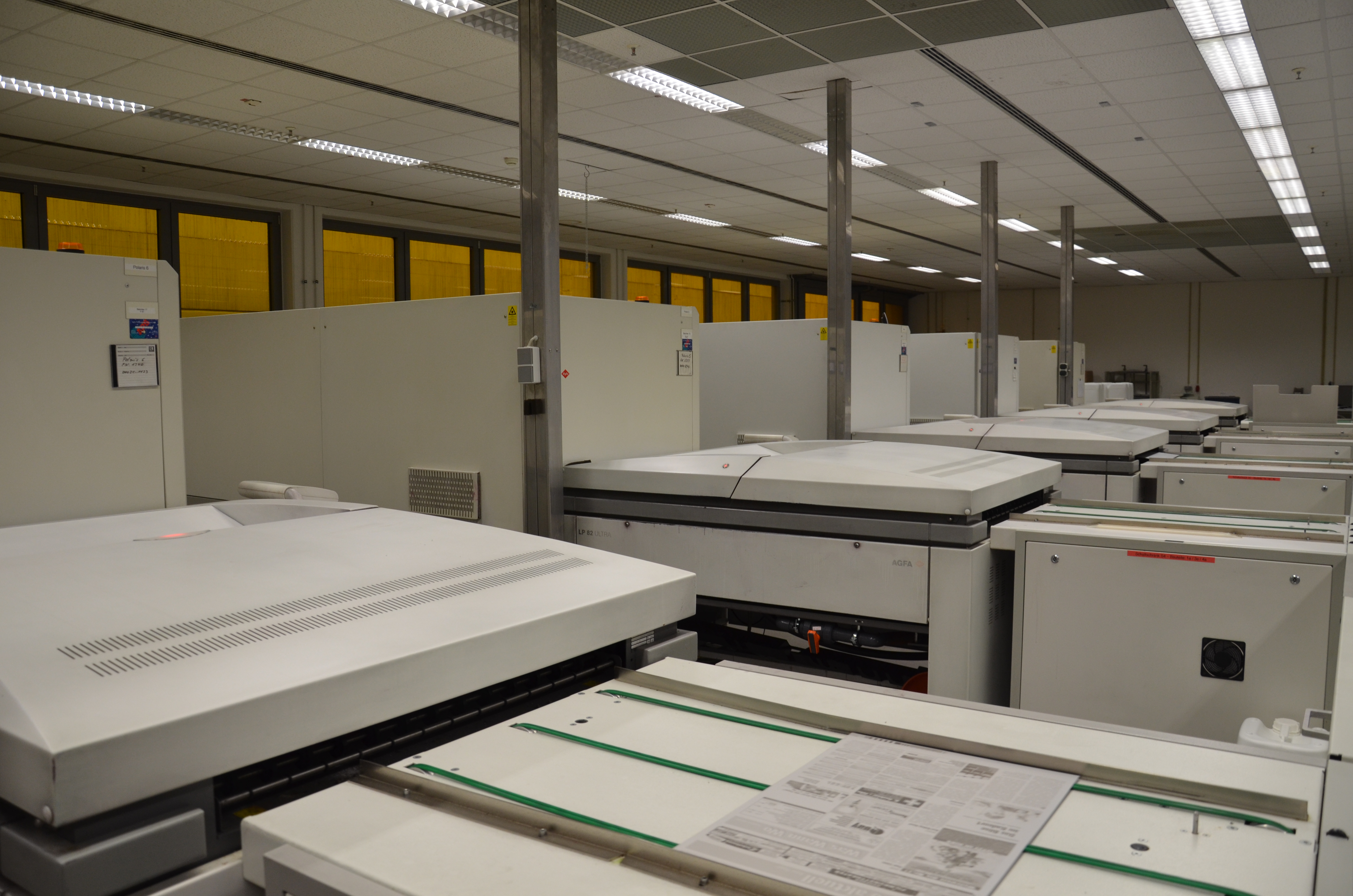 Druckhaus der WAZ Mediengruppe in Essen: Plattenbelichtung und -entwicklungseinheiten von AGFA.